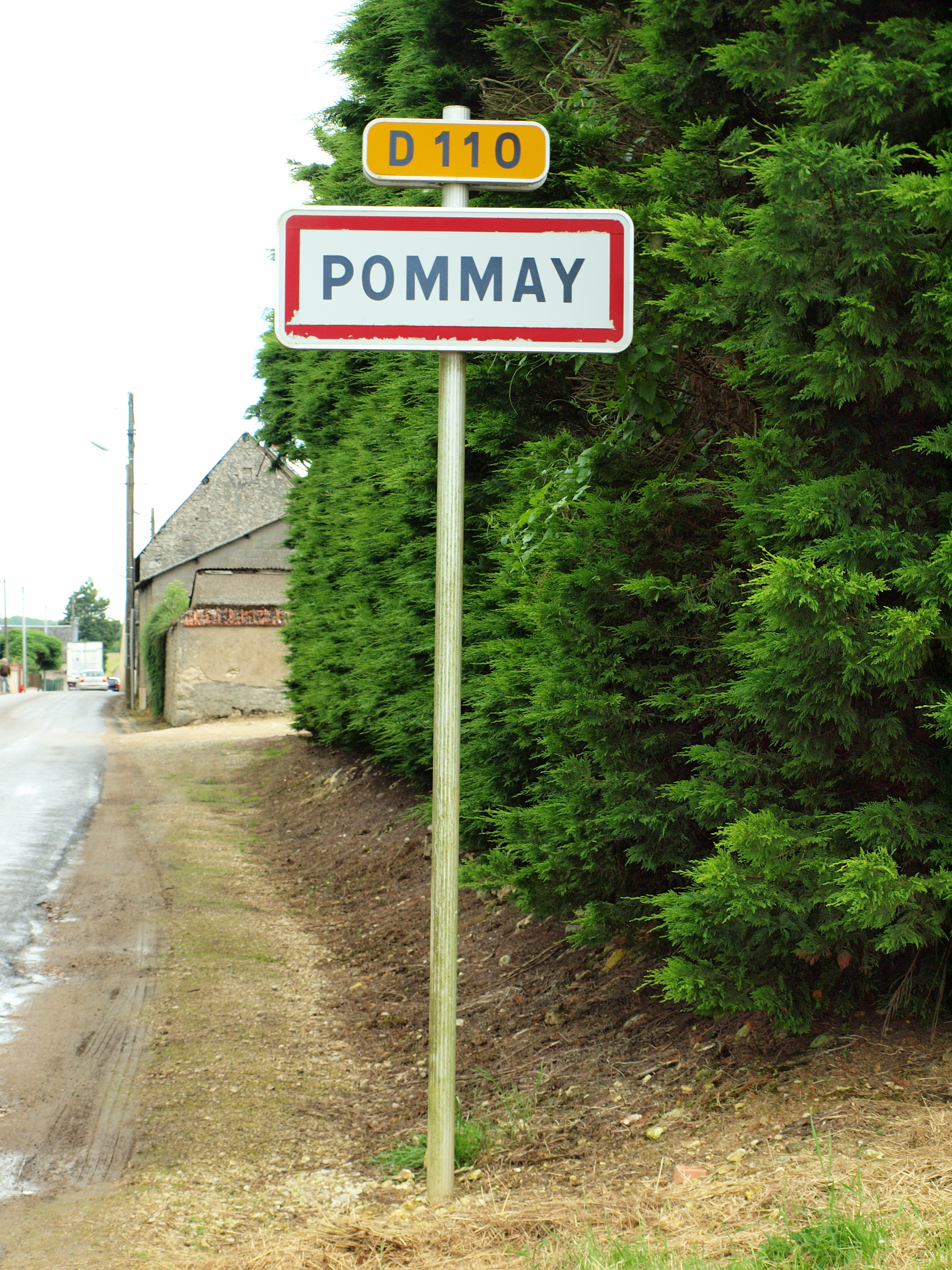 Pommay (hameau de la commune de Varize, Eure-et-Loir, France)